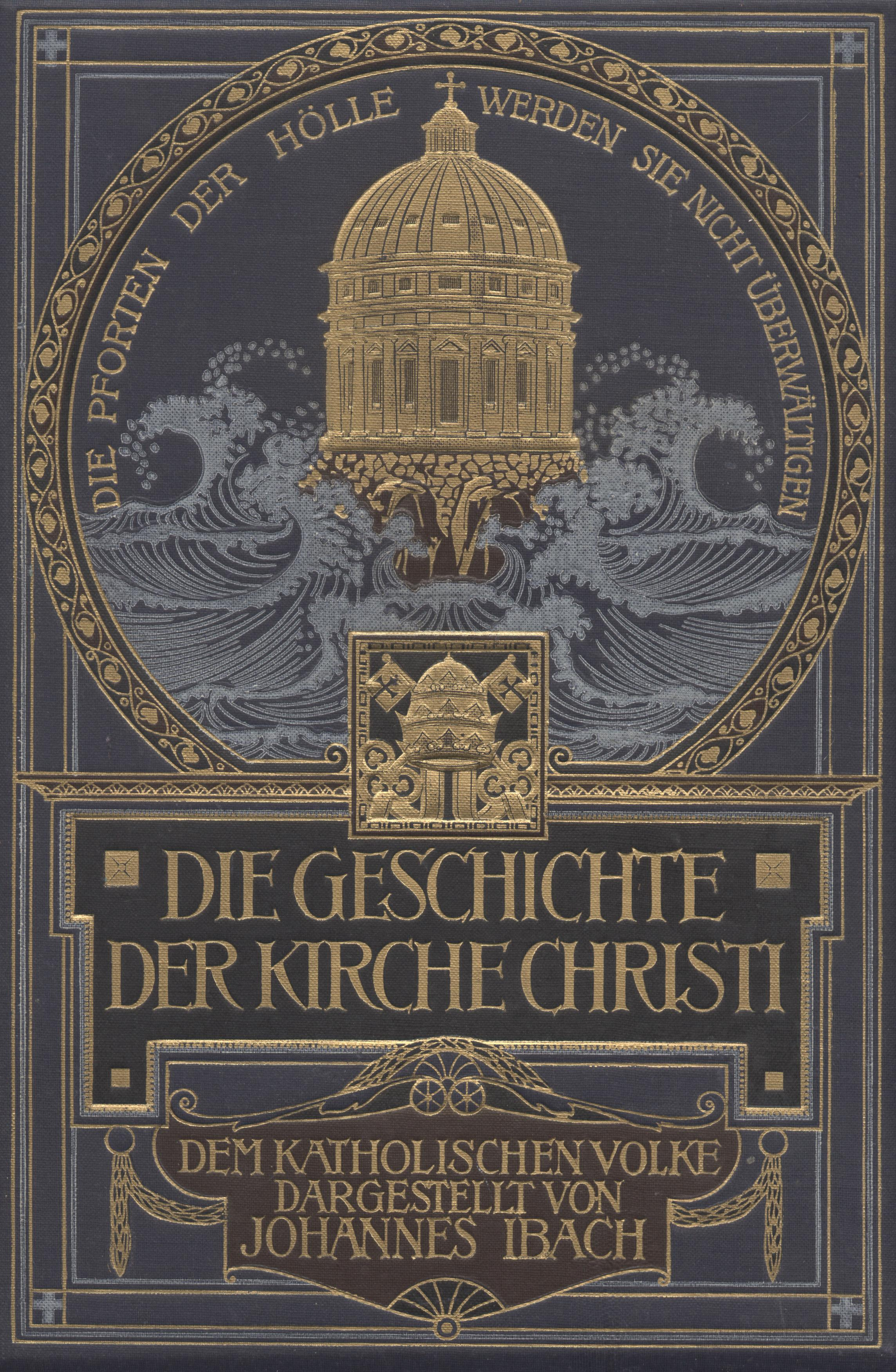 Pfarrer Johannes Ibach, Villmar, preuss. Landtagsabgeordneter, von ihm verausgabte Kirchengeschichte